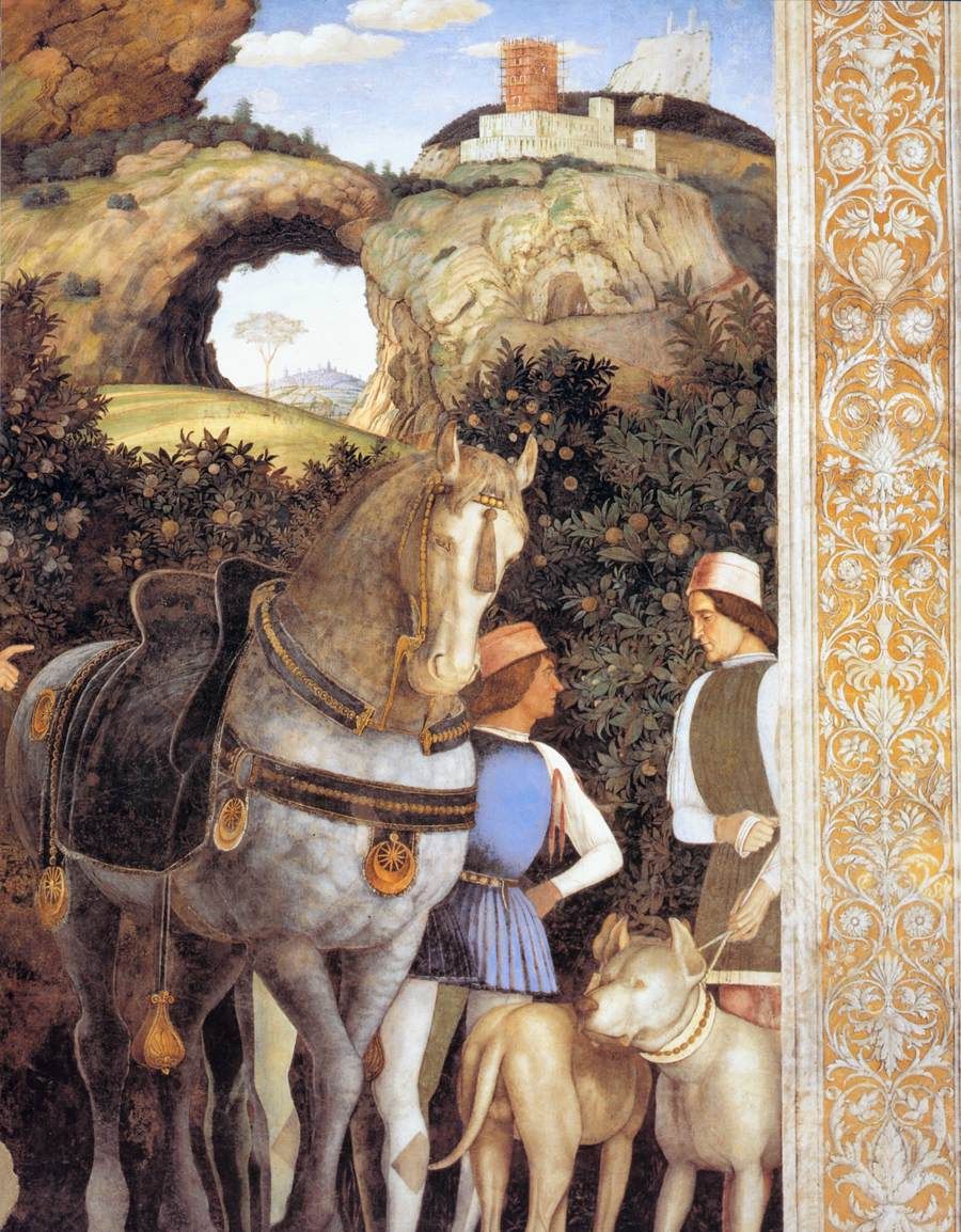 detail